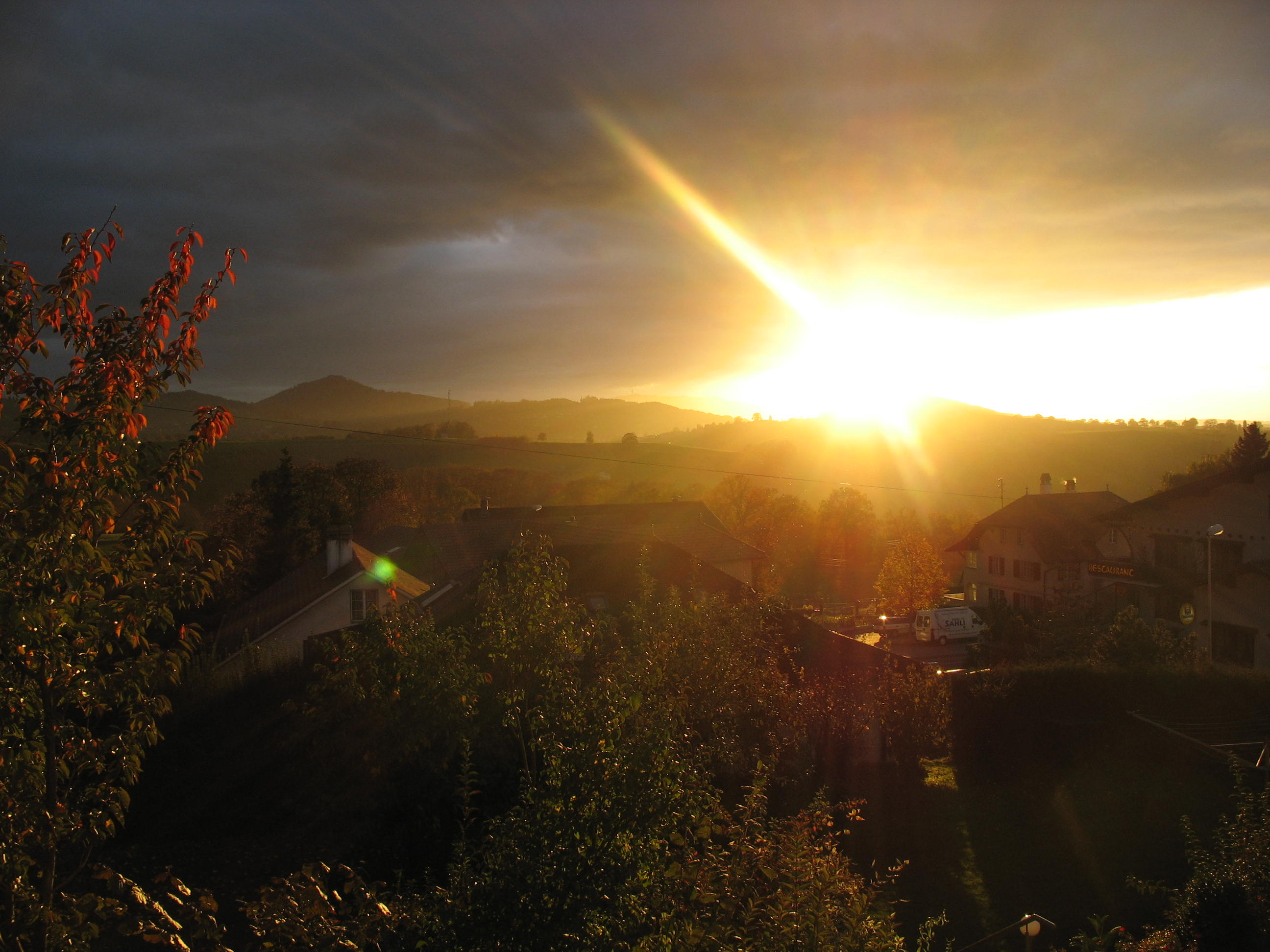 Sonnenuntergang, 1. November 2006